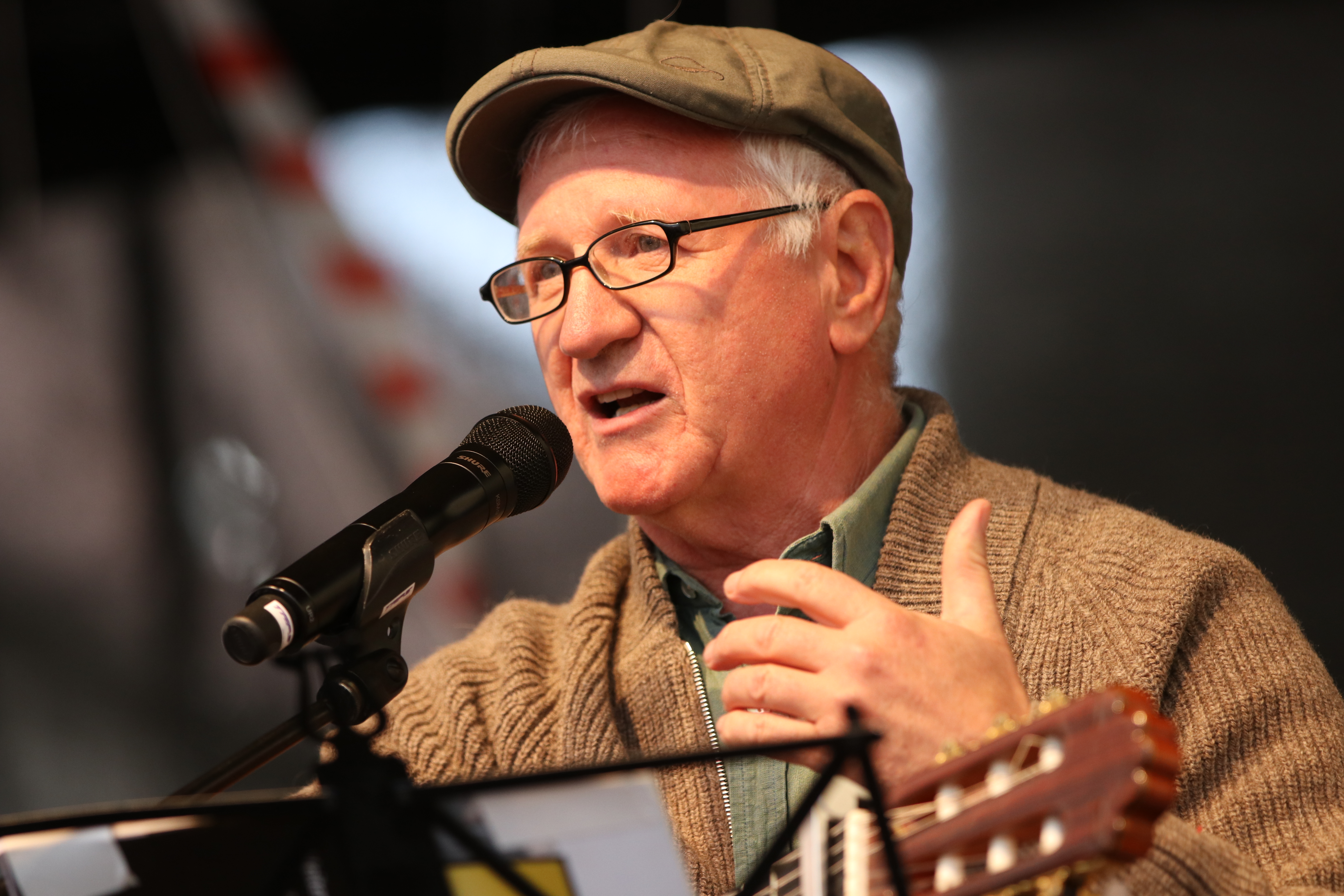 Hans Well und Wellbappn am 2018-10-03 auf dem Münchner Odeonsplatz